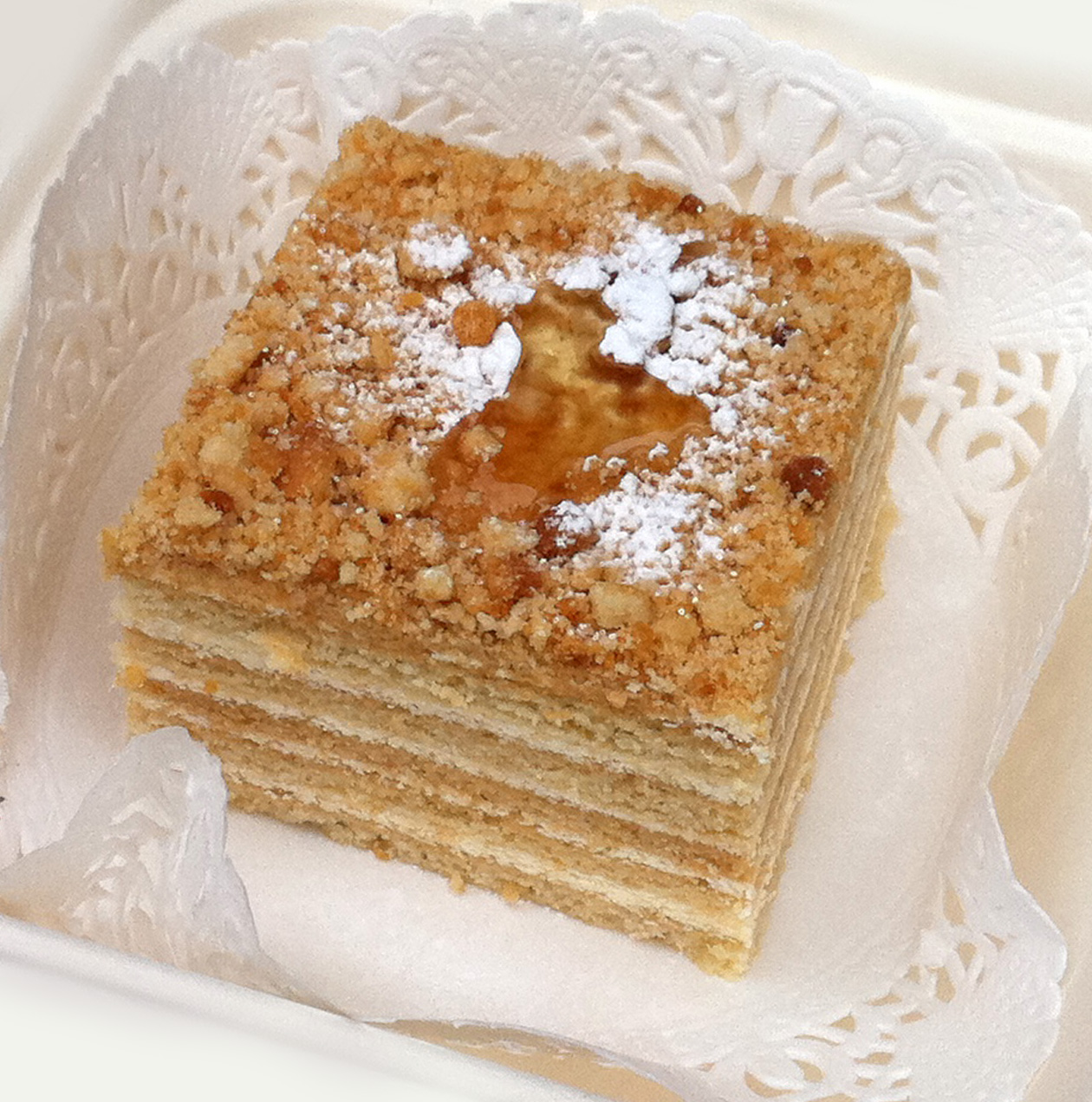 Il medovik (медовик) è un dolce diffuso in Russia e nei paesi dell'ex Unione Sovietica.